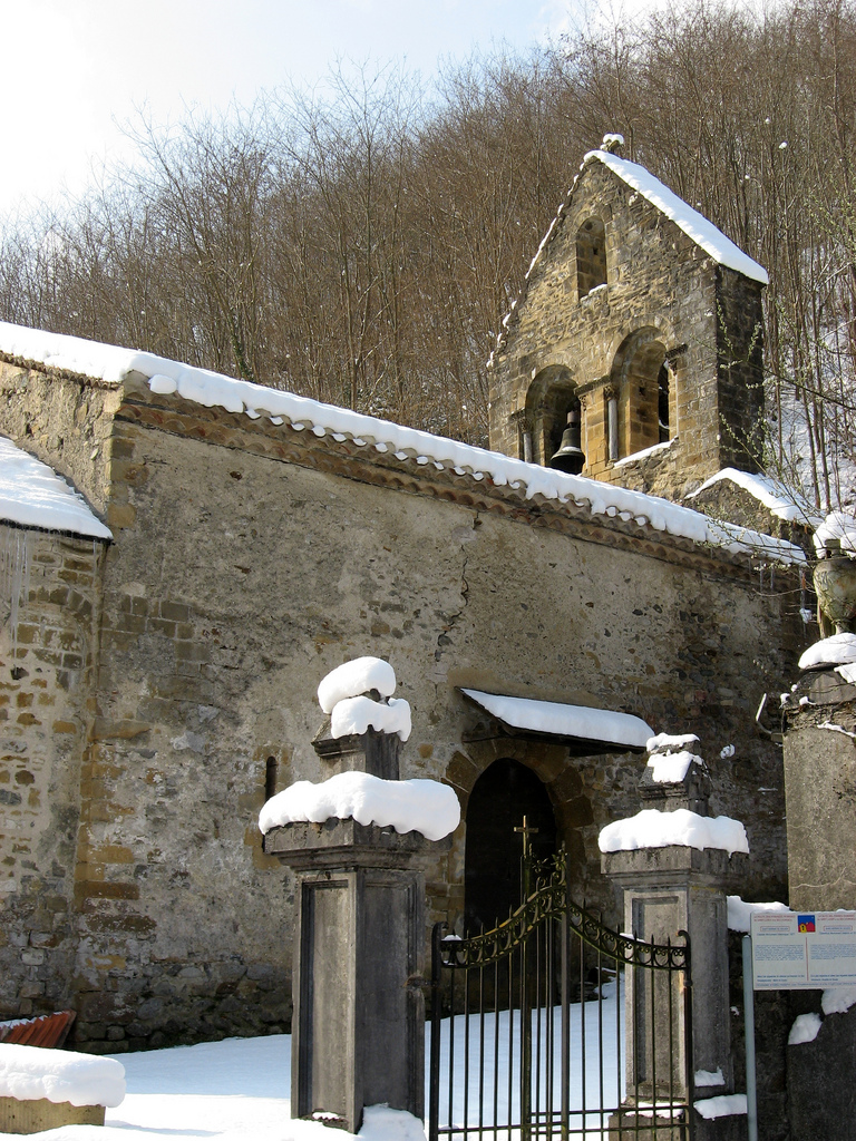 Côté nord et clocher pignon de la chapelle Saint-Sernin de Soueix-Rogalle (Ariège, France). .